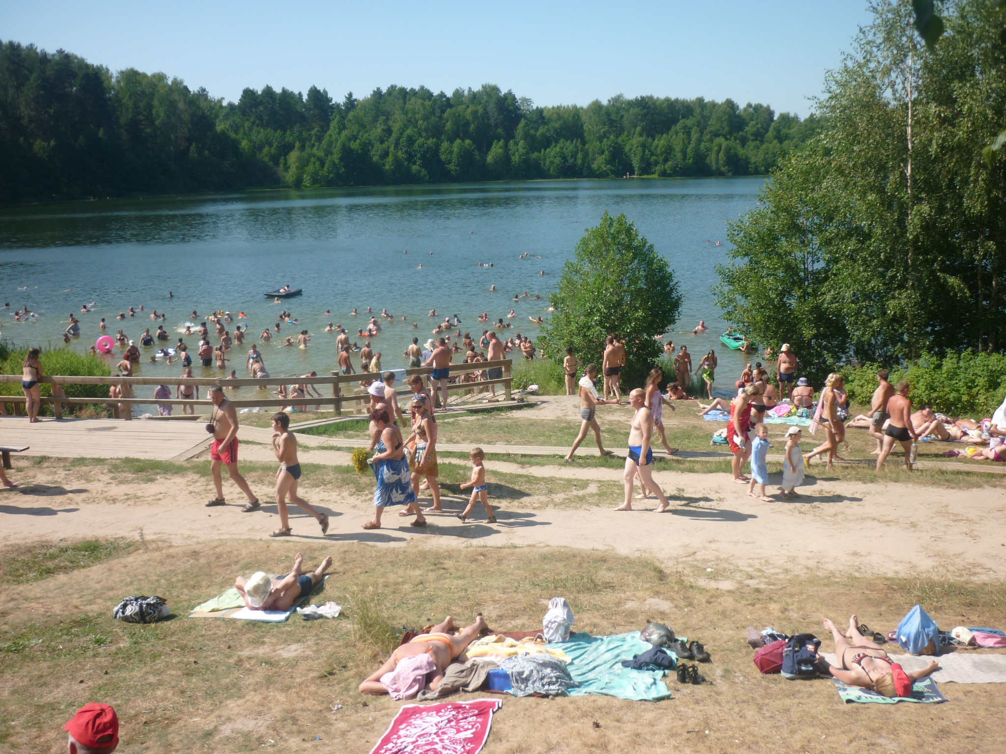 Пляж на берегу озера Светлояр